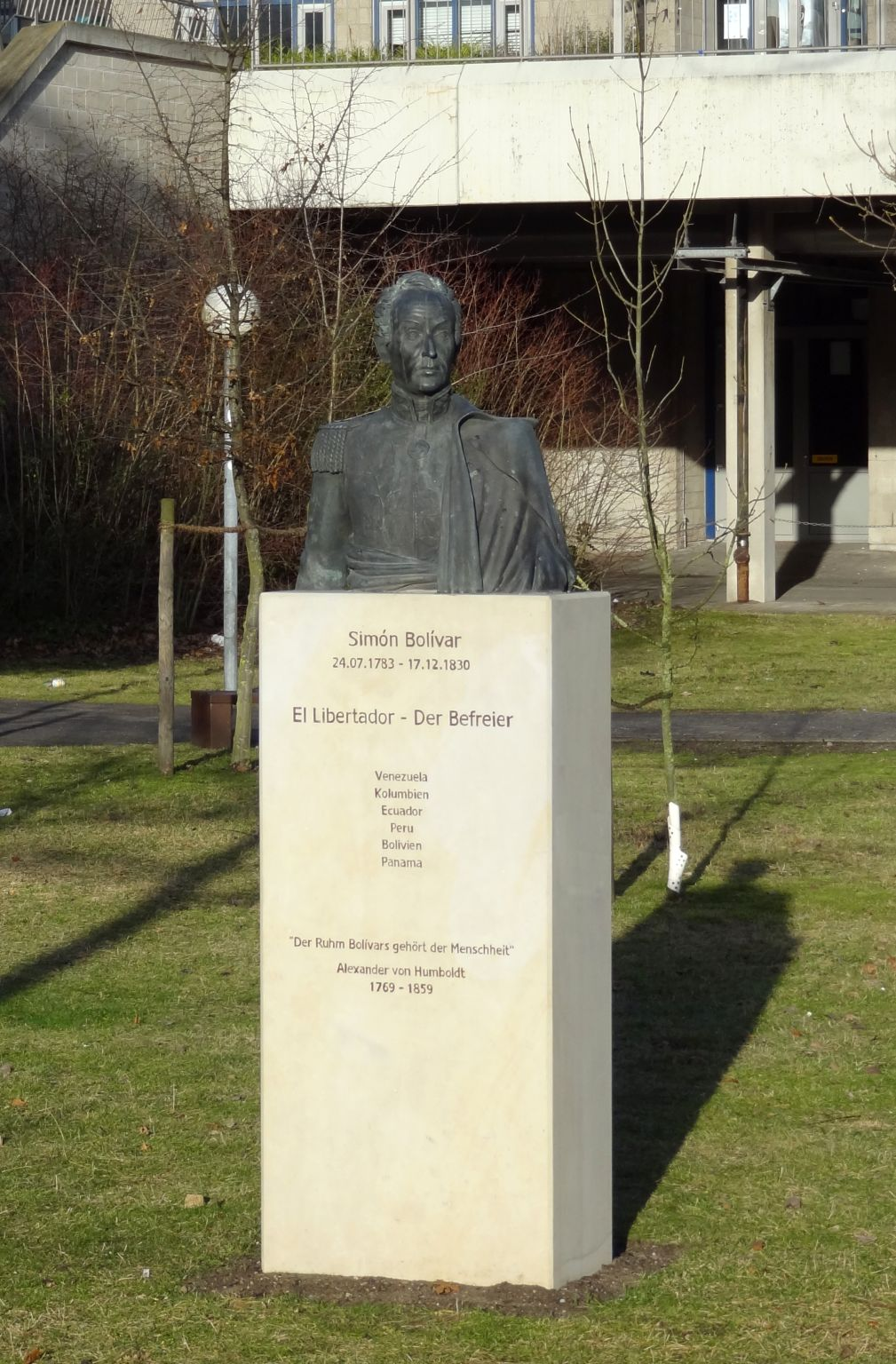 Bronzeplastik des Simon Bolivar nach einer Marmorbüse von Ernst von Wacholt . Standort an der Enrique-Schmidt-Straße in Bremen.